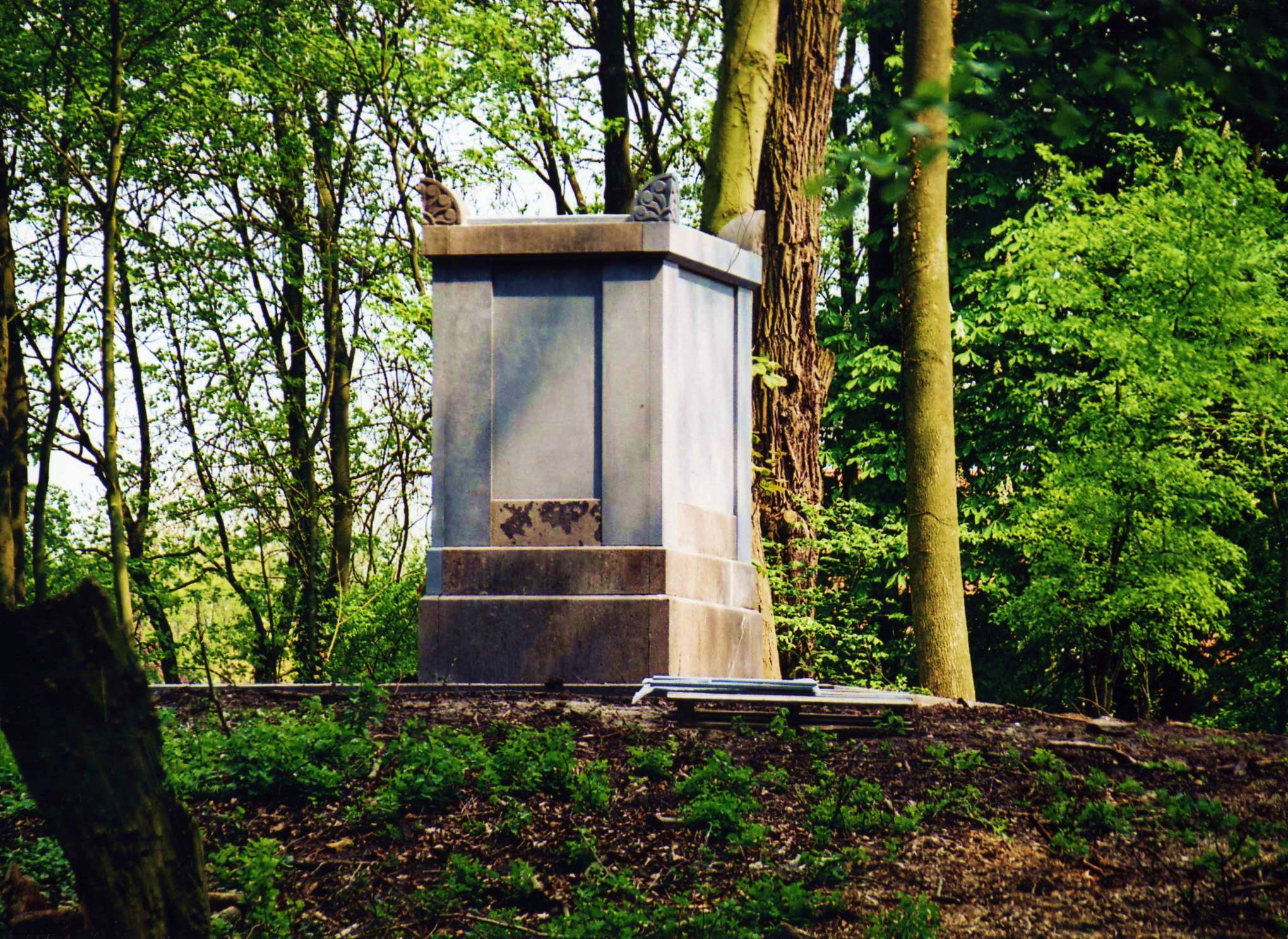 Het grafmonument van baron J.G. Verstolk op de kasteelheuvel van het verdwenen kasteel Aldenhaag te Zoelen.